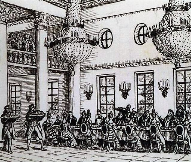 «Дубровский». Обед у Троекурова.jpg